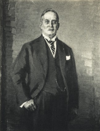 Bildnis des Dresdner OB Bernhard Blüher